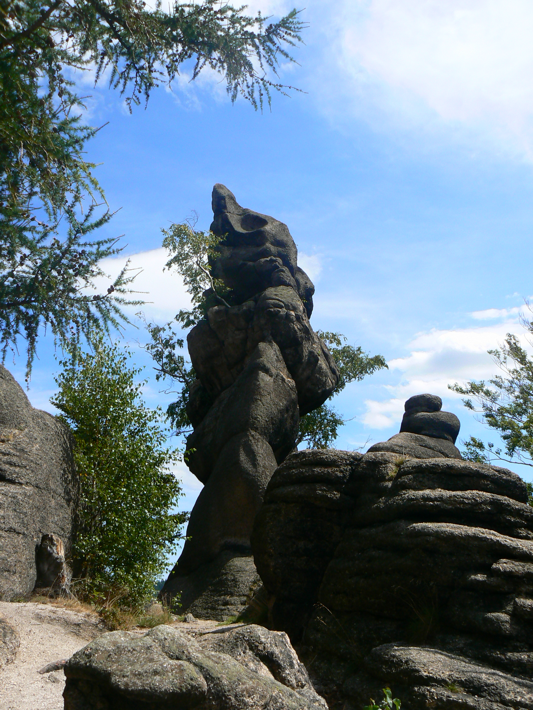 Rudawy Janowickie, Starościńskie Skały.